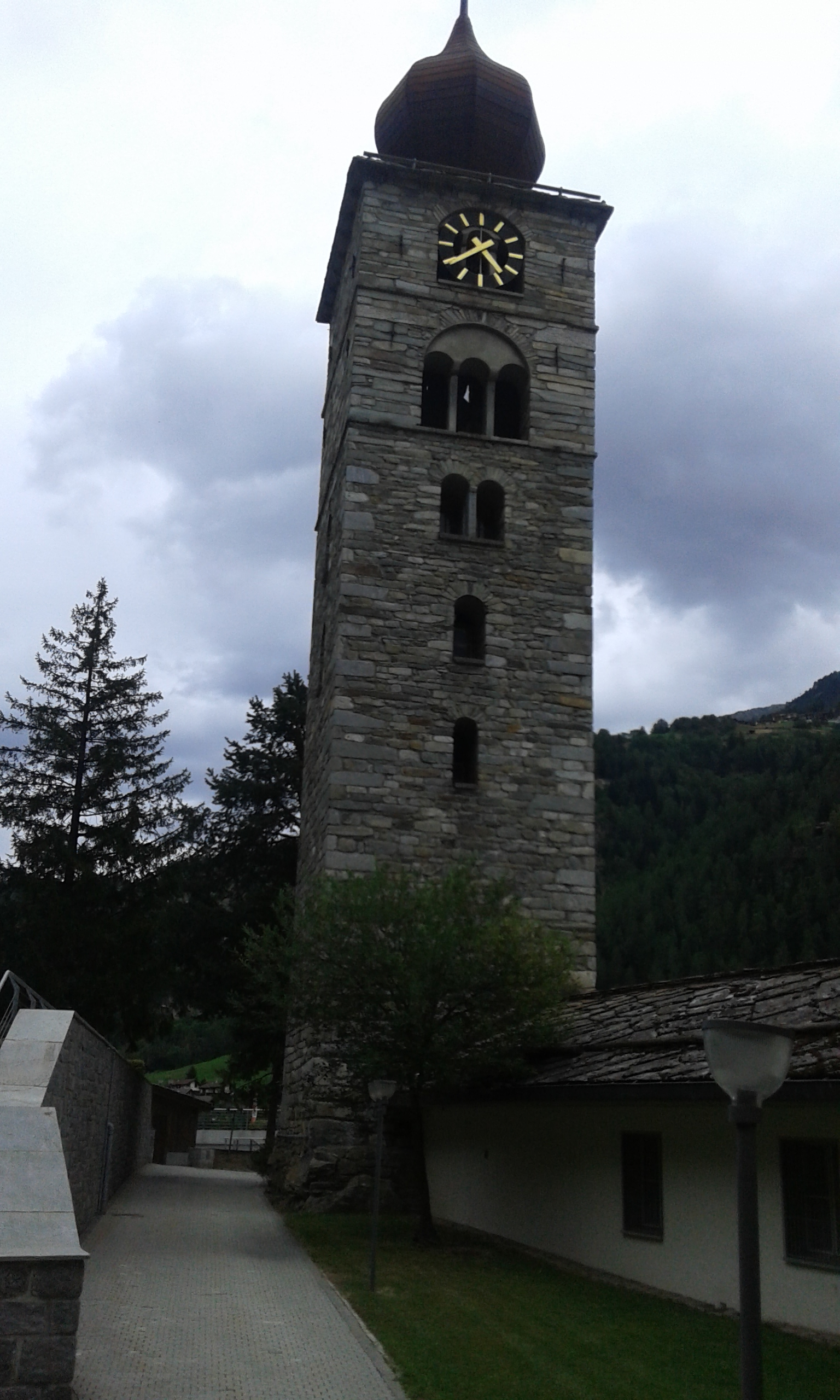 Südseite des Kirchturms der Pfarrgemeinde St. Niklaus VS, Wallis, Schwiz.